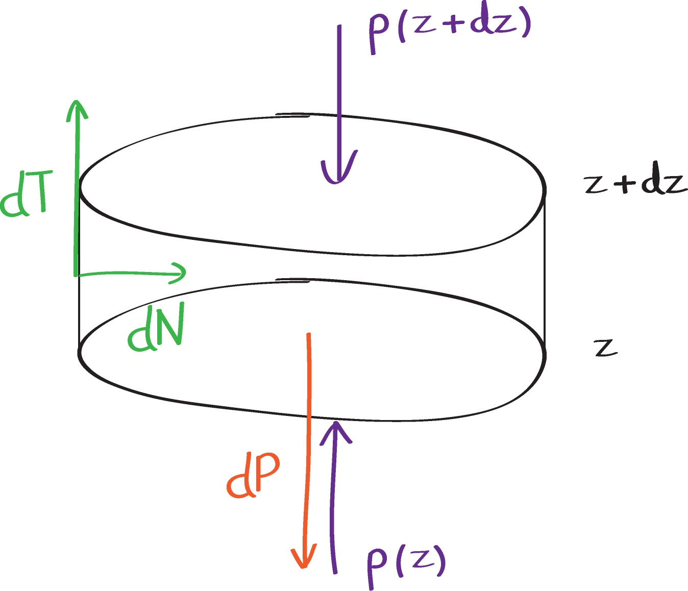 Modèle de Janssen : bilan des forces sur une tranche de silo